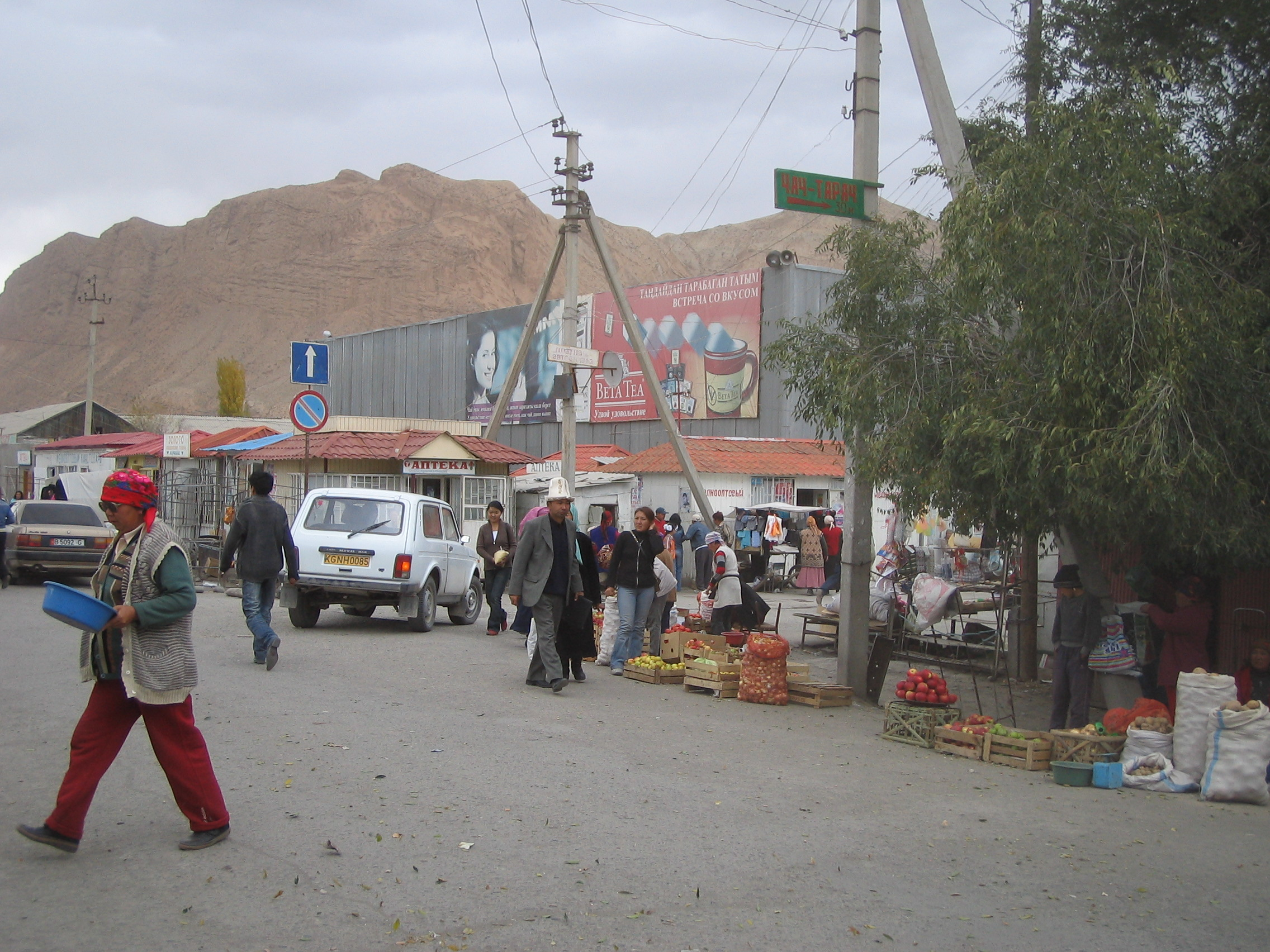 Marknaden i Naryn, Kirgizistan. Naryn market, Kyrgyzstan.